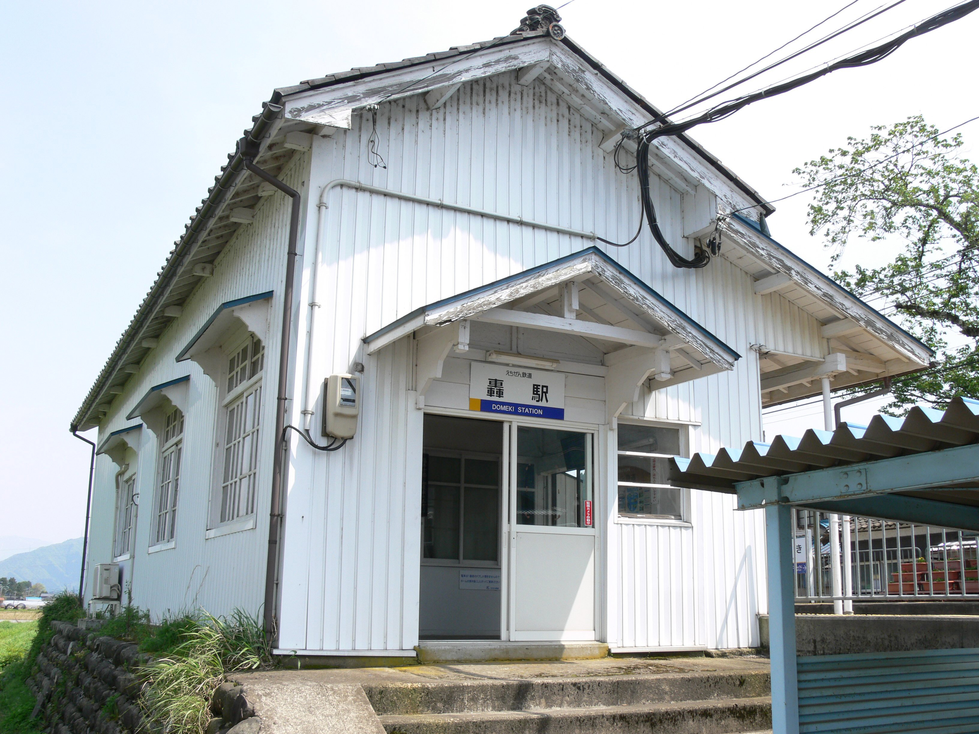 Domeki Station